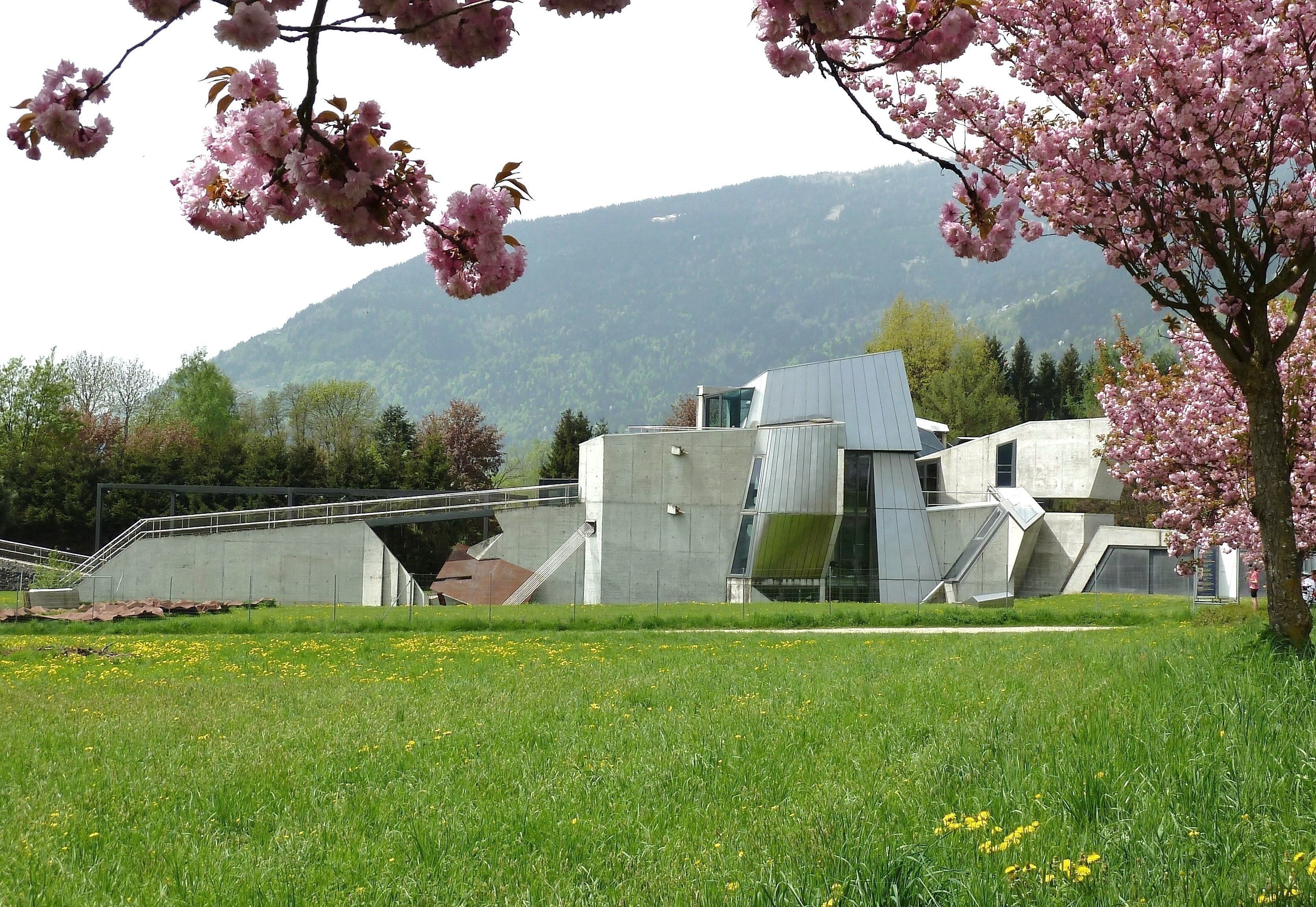 Das Steinhaus Domenig in Steindorf am Ossiacher See